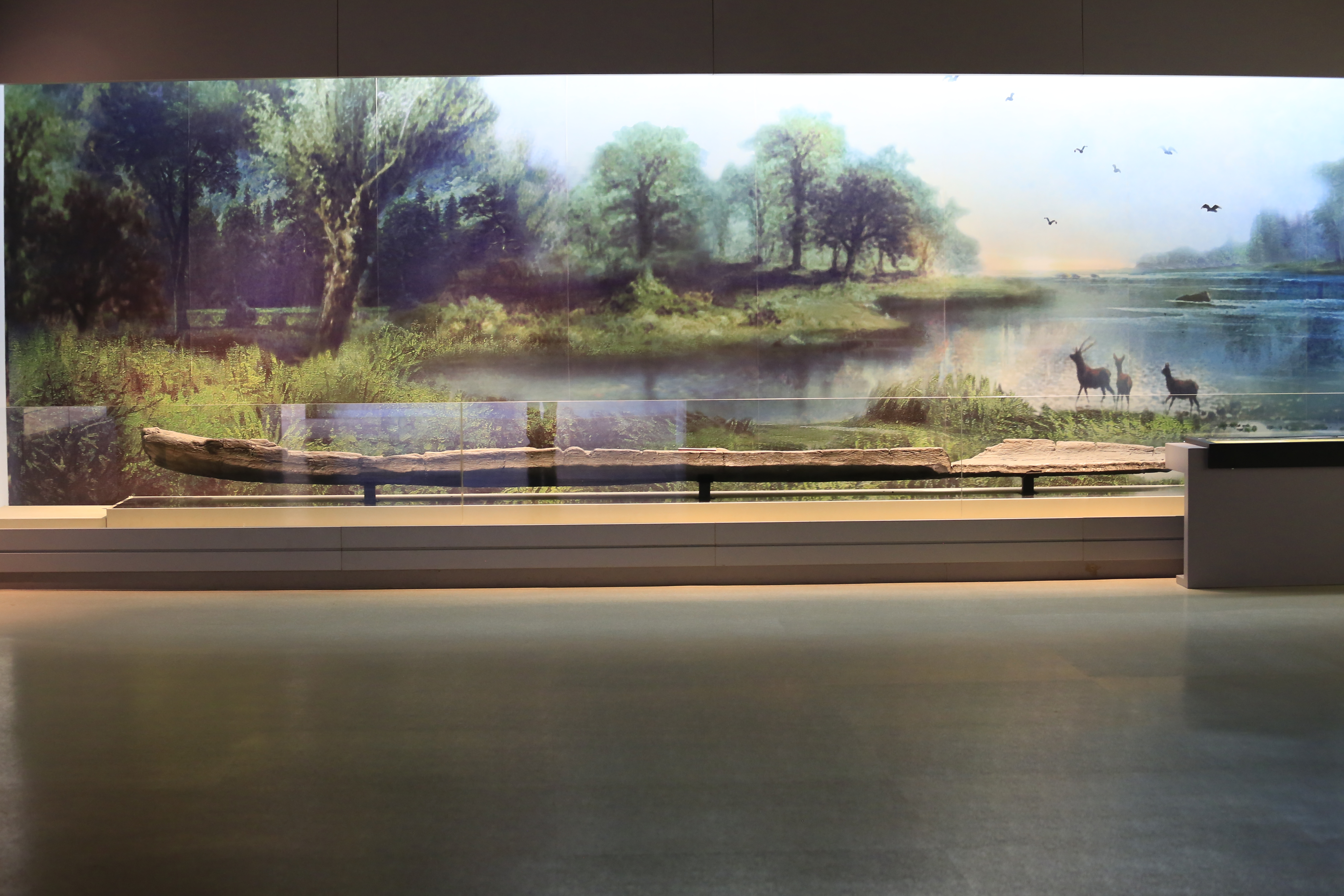 浙江省博物馆武林馆区—— 独木舟，跨湖桥遗址出土